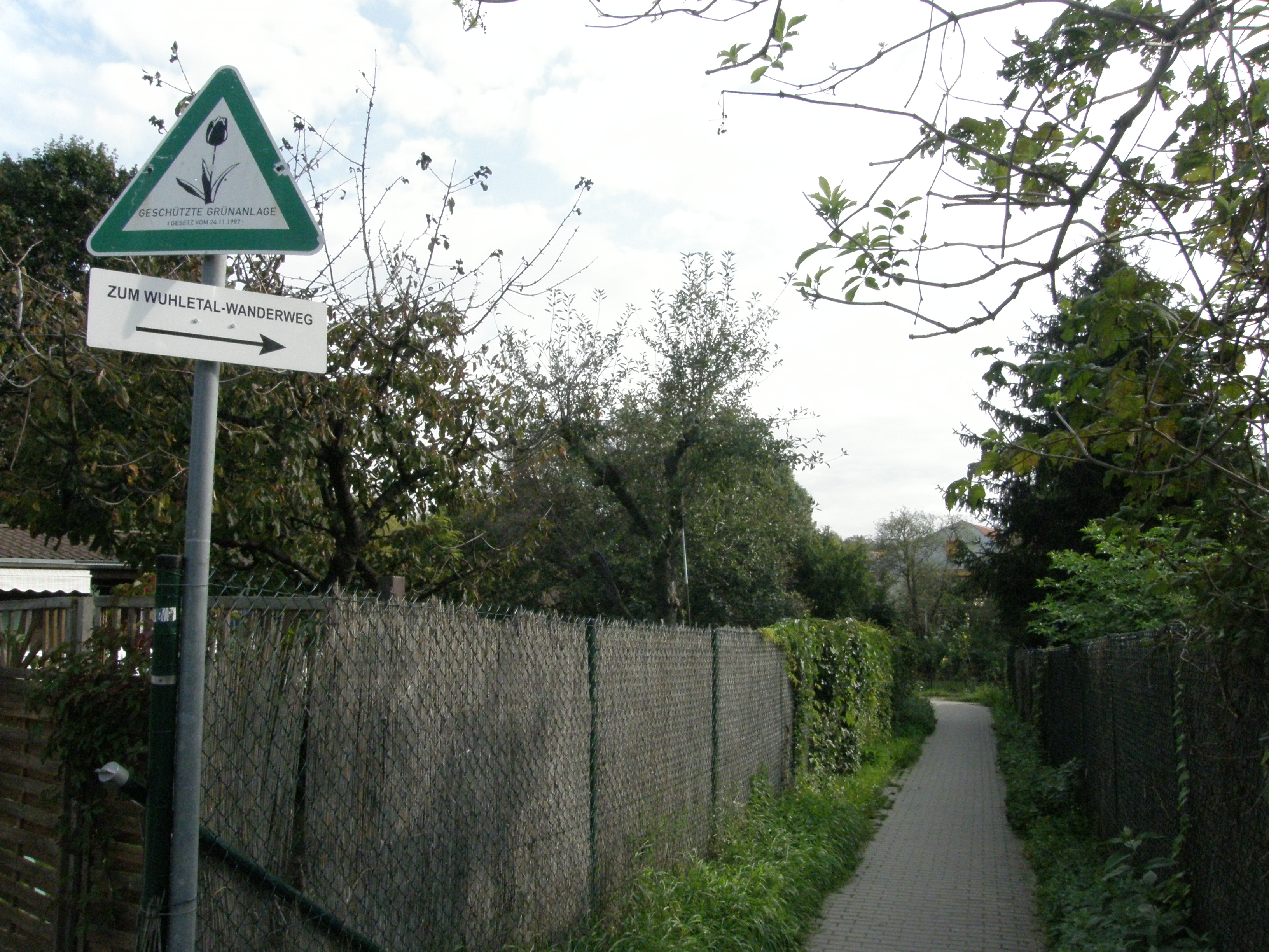 Berlin-Biesdorf, Wuhletal-Wanderweg